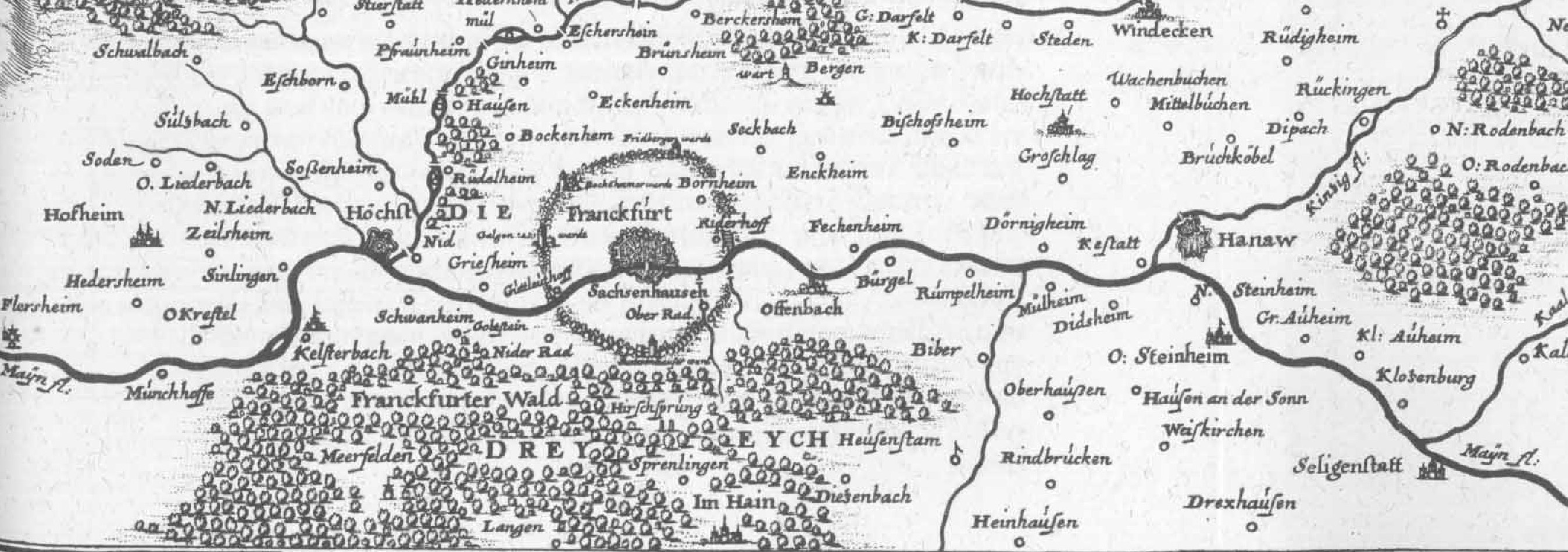 Teilgebiet des Wildbannes Dreieich, Ausschnitt aus einer Karte von Matthäus Merian